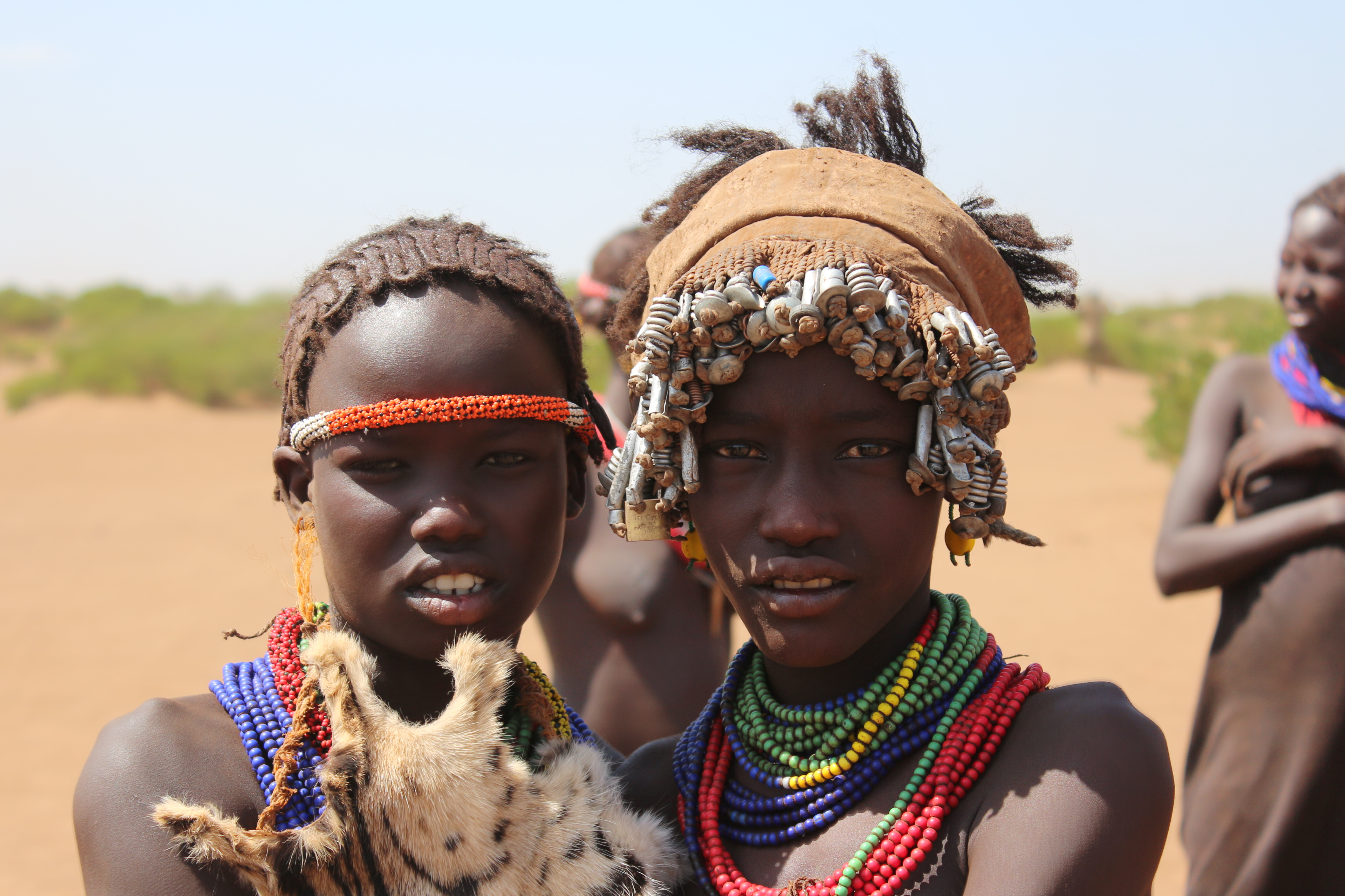 Photo prise dans un vvillage Dassanech est situé en Éthiopie, près de la rivière Omo, à proximité d'Omorate.